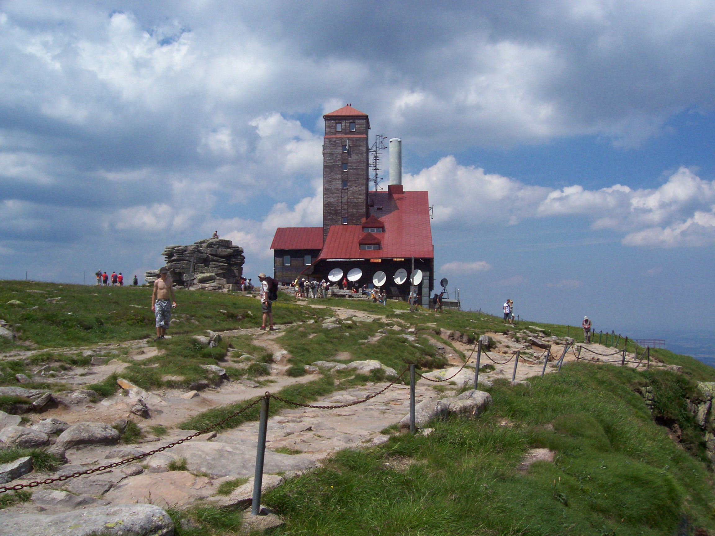 Stacja radioprzekaźnikowa na śnieżnych kotłach (Karkonosze, Polska)